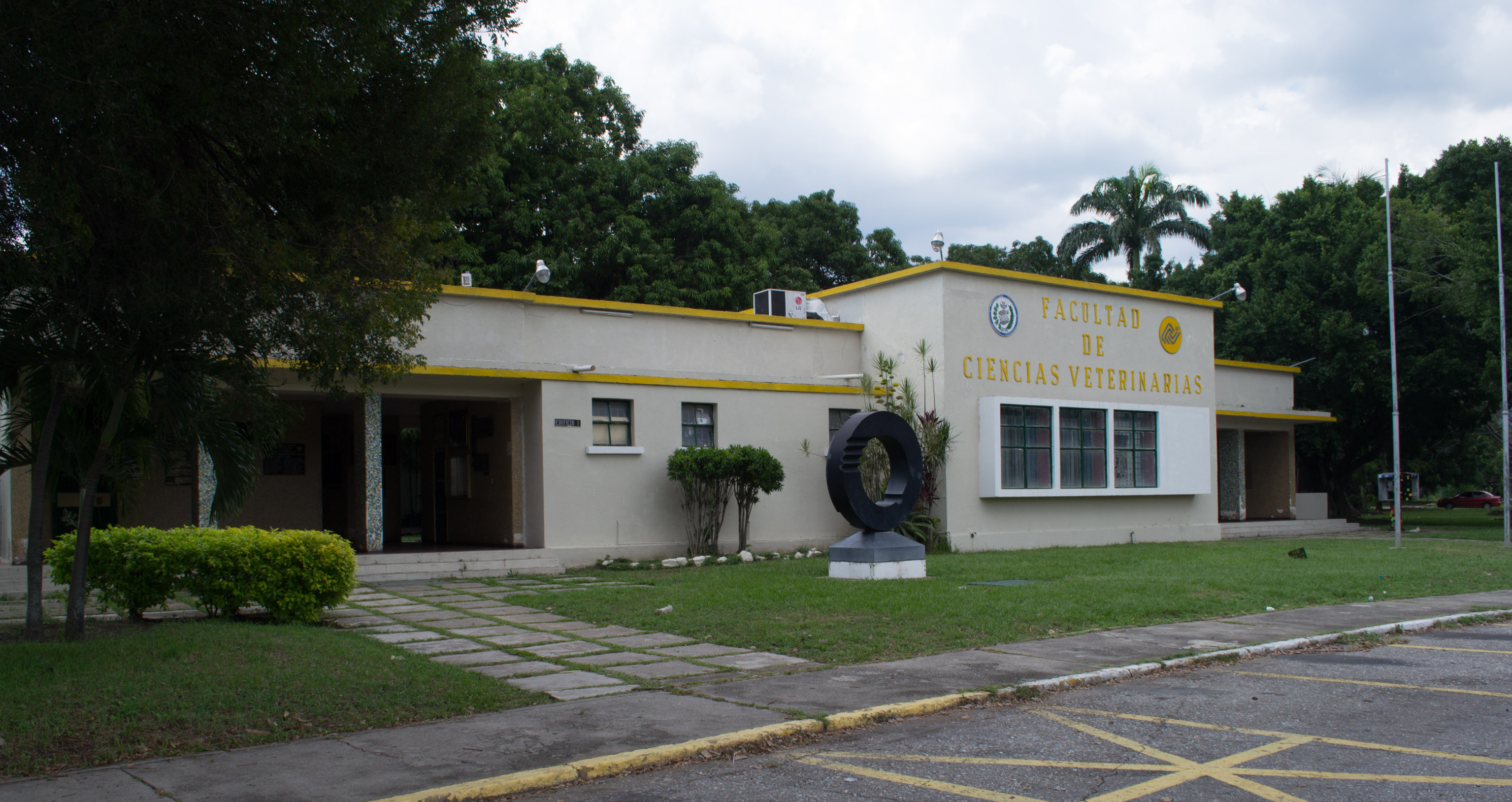 Facultades de Agronomía y Veterinaria de la Universidad Central de Venezuela